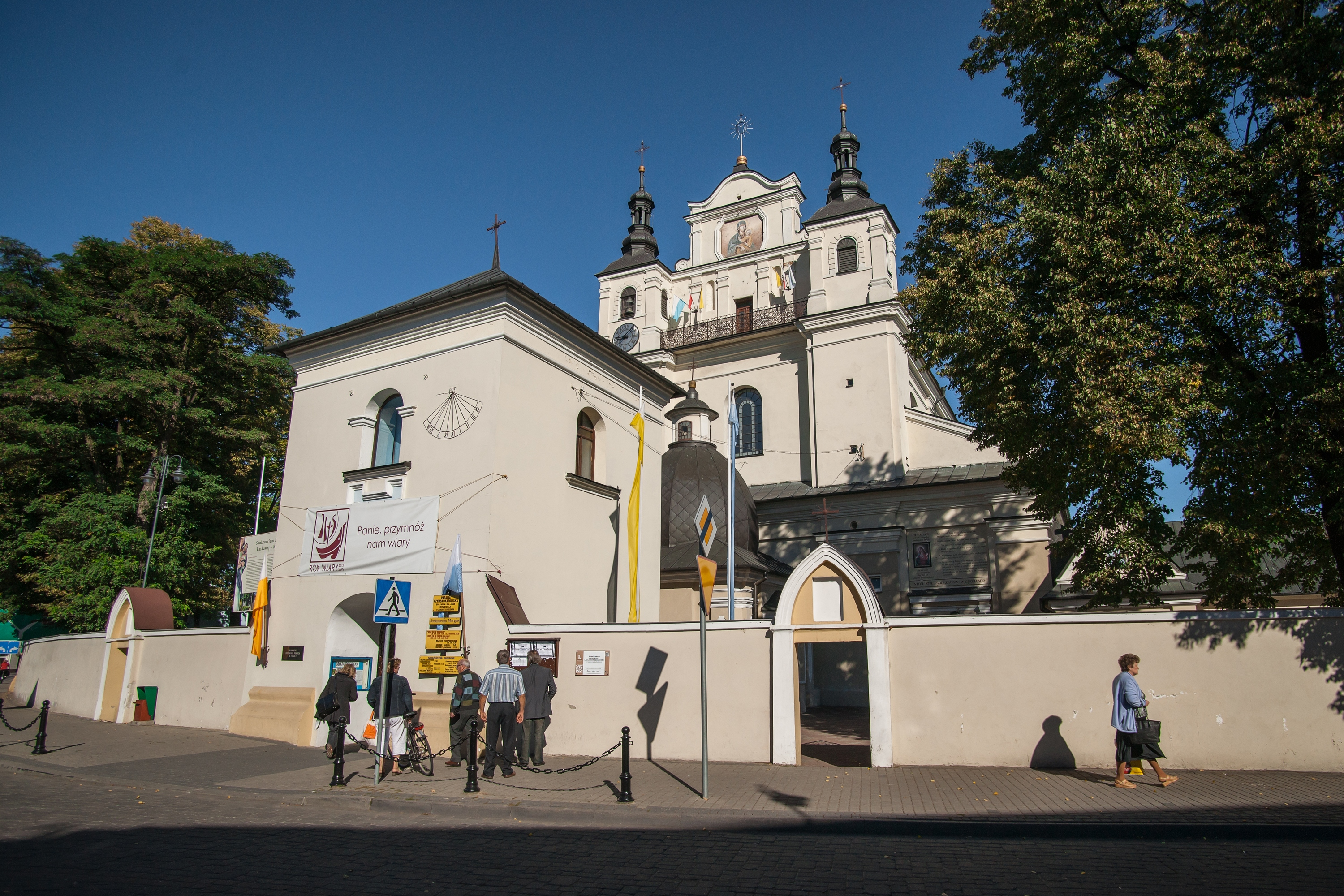 Janów Lubelski - dawny kościół klasztorny, obecnie parafialny p.w. św. Jana Chrzciciela, kon. XVII, XVIII